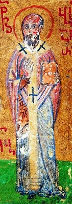 Сщмч. Василий Анкирский. Миниатюра.